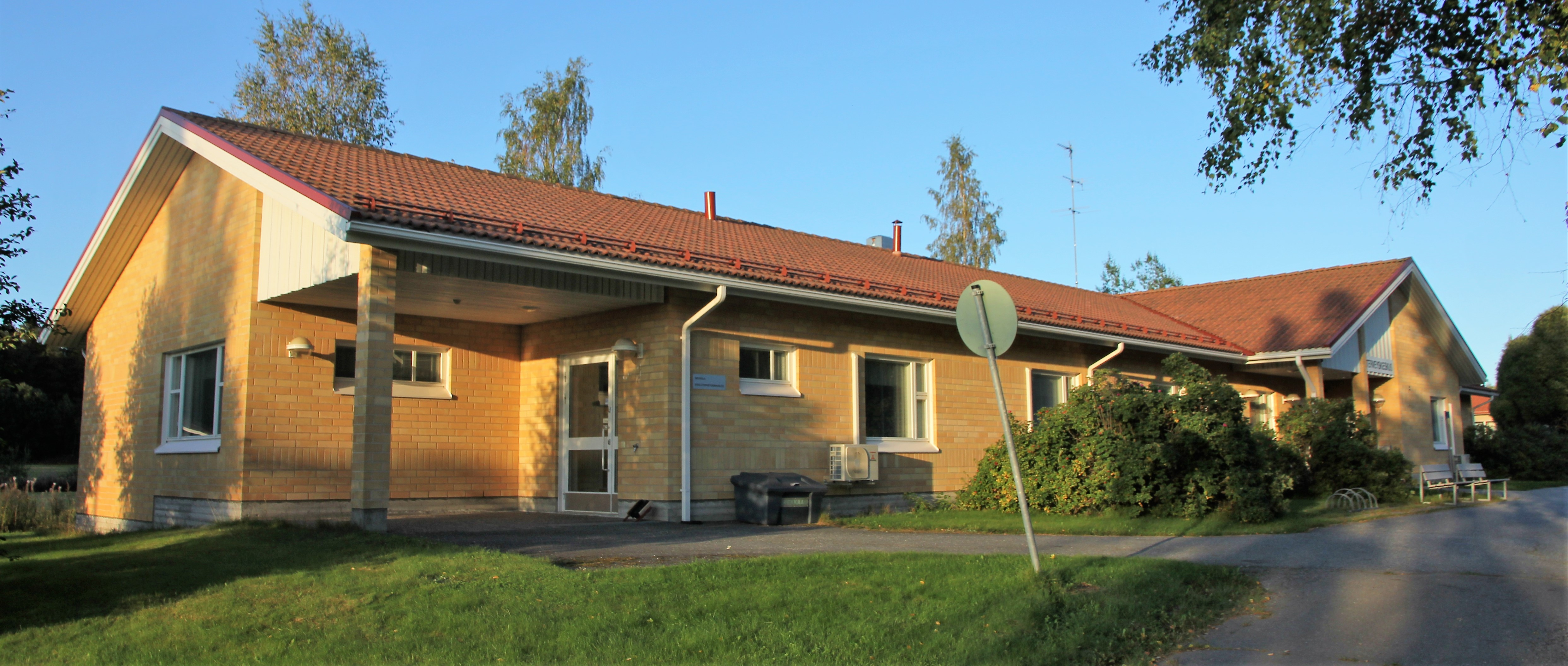 Vehmersalmen terveysasema osoitteessa Vehmersalmenkatu 10, Kuopion Vehmersalmen pitäjän kirkonkylällä, nykyisessä Kuopion Vehmersalmen kaupunginosassa.